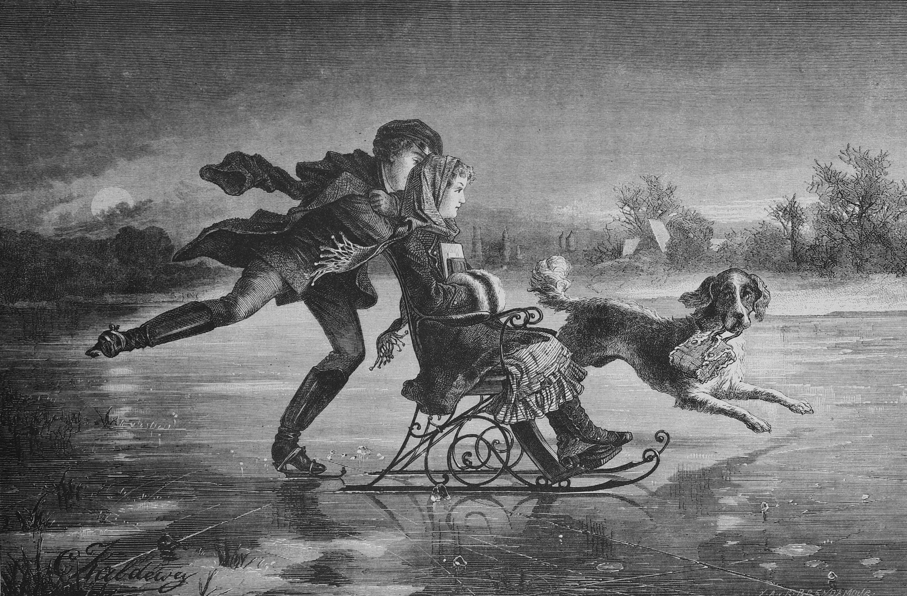 Liebesfrühling auf dem Eise.